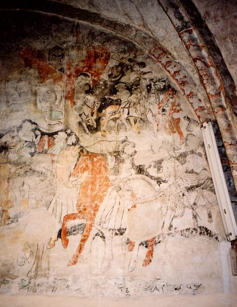 Polichromia, kościół filialny pw. św. Antoniego w Strzelnikach, Mistrz Brzeskich Pokłonów Trzech Króli